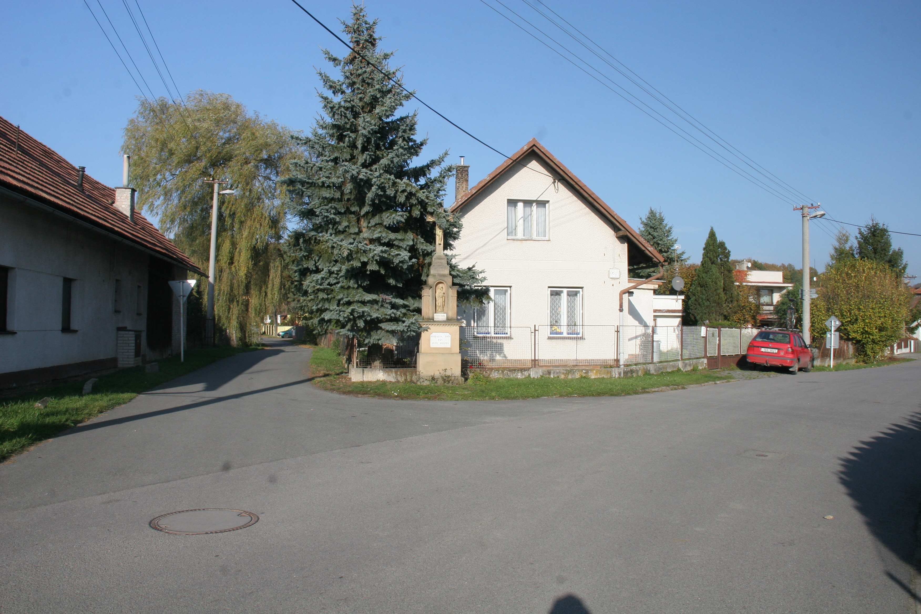 Podlesí kříž